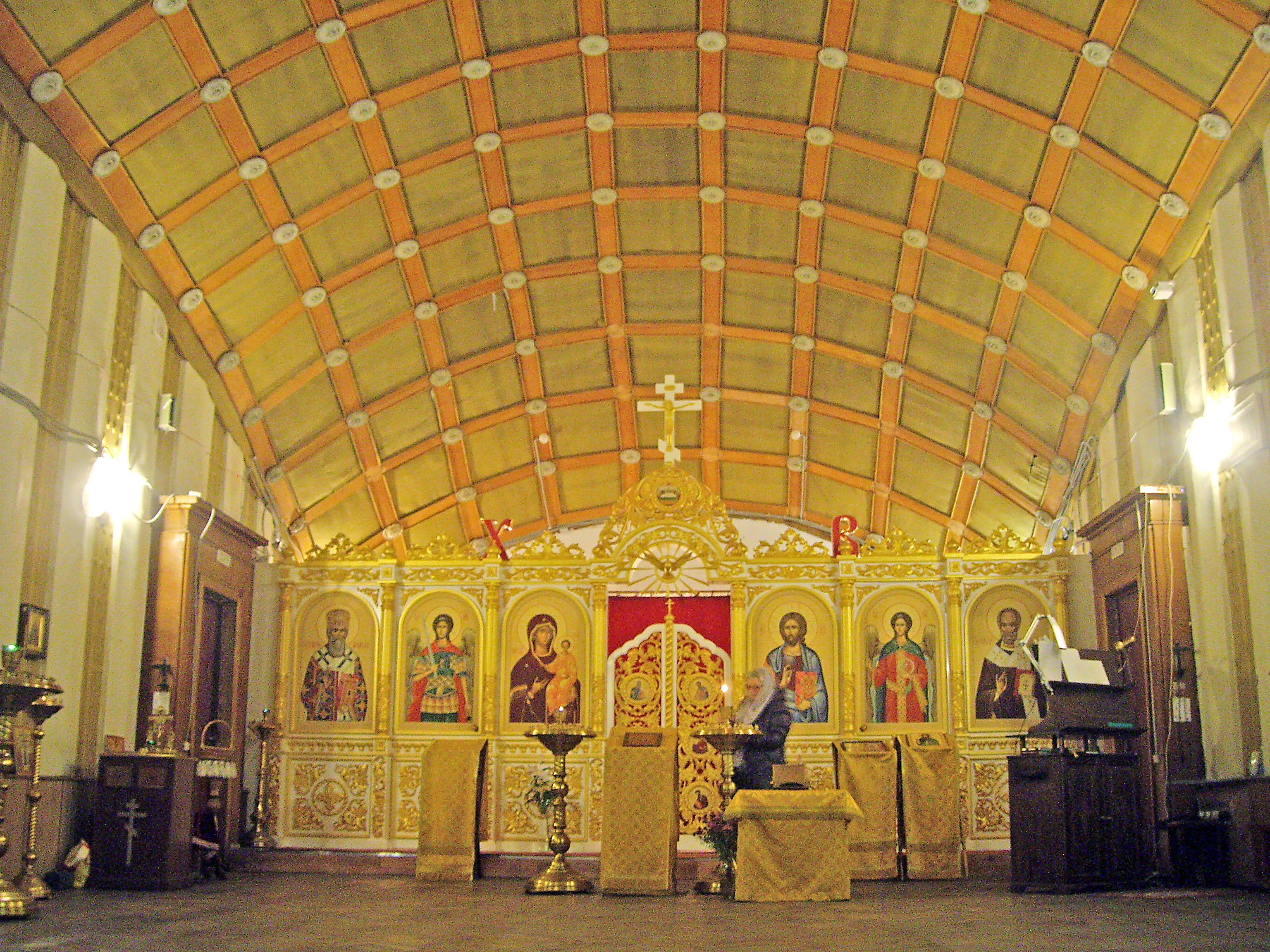 Временный храм на втором этаже перепланированного здания Церкви.